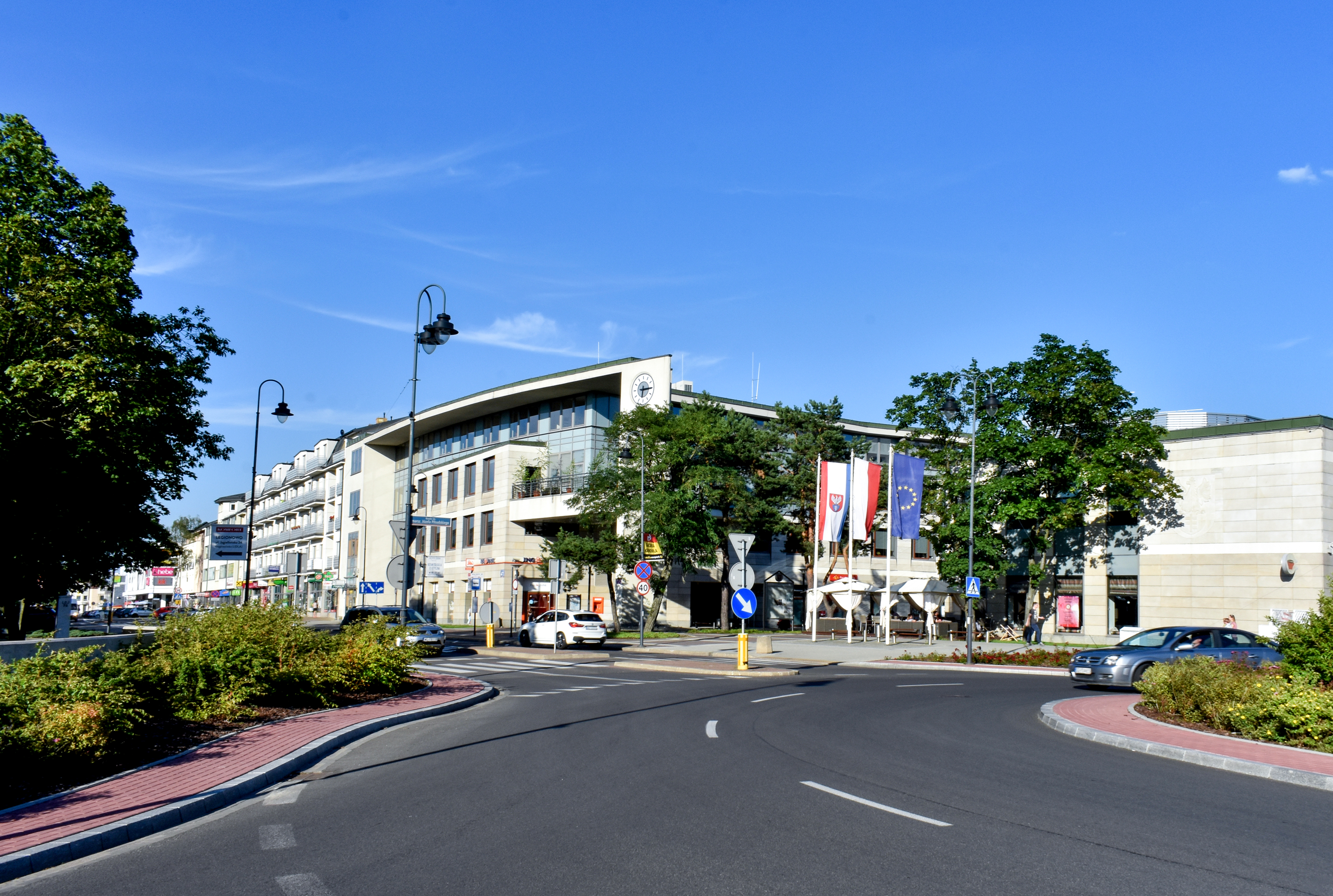 Widok na Urząd Miasta w Legionowie